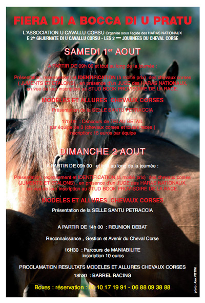 Affiche de la foire du col du pratu